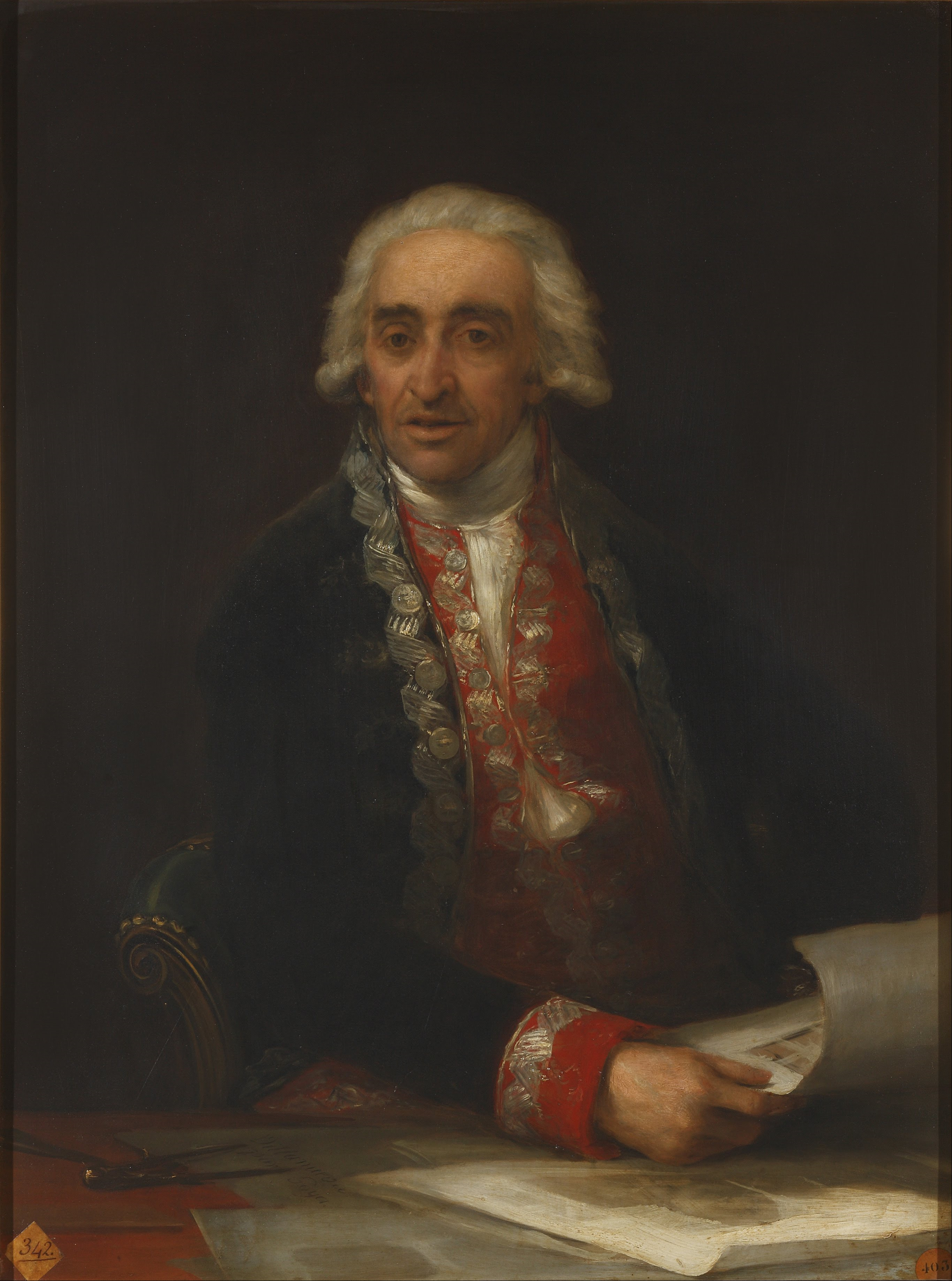 Retrato del arquitecto español Juan de Villanueva (1739-1811).